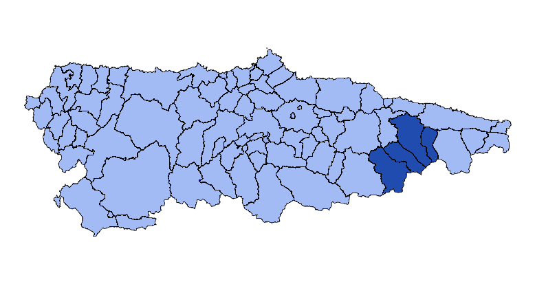 Concejos que forman la mancomunidad asturiana de los Concejos de Cangas de Onís, Amieva, Onís y Ponga